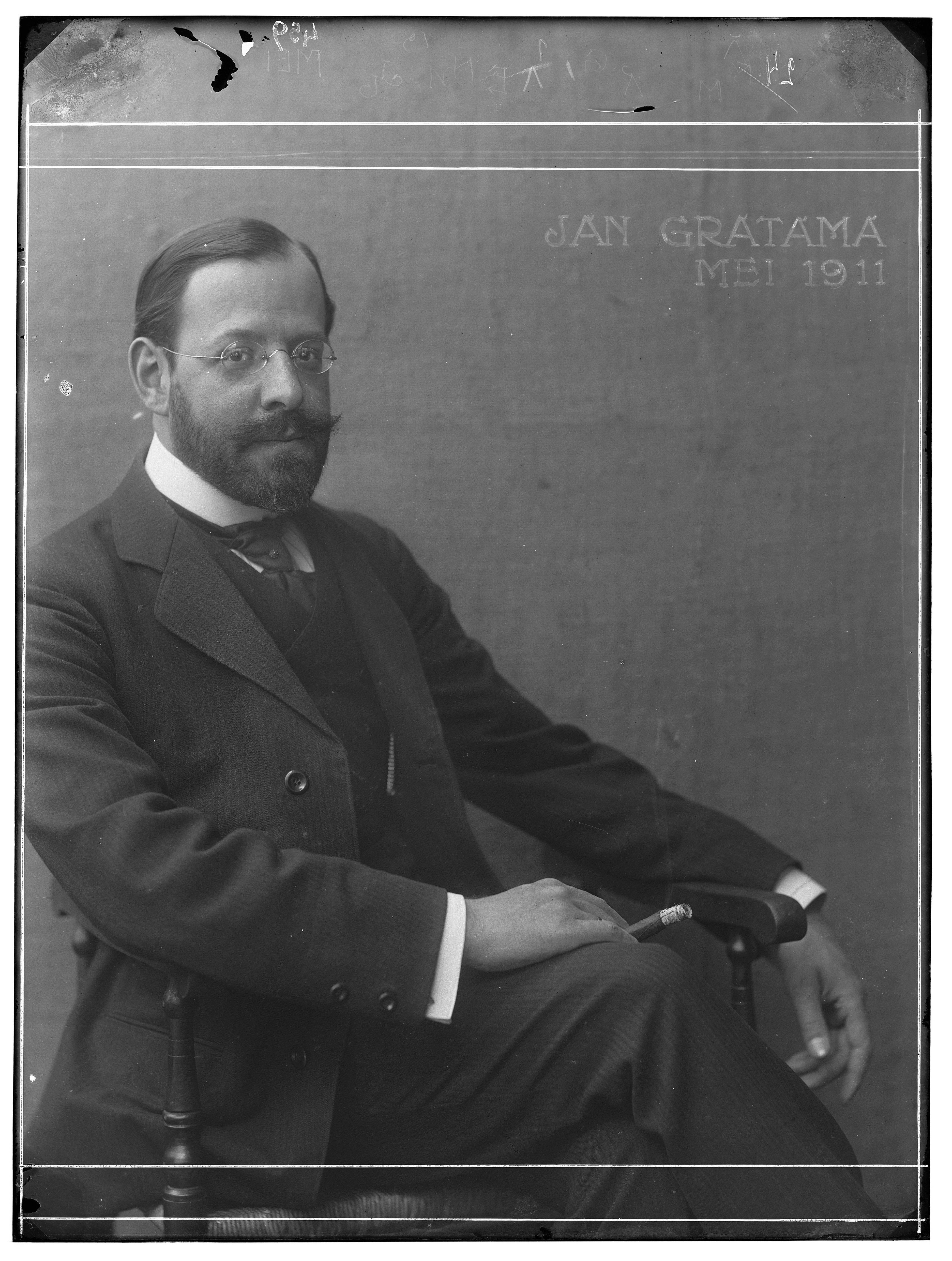 Beschrijving Portret van Ir. Jan Gratama ( 1877-1947) Architect, schilder en tekenaar. Documenttype foto Vervaardiger Eilers, Bernard F. Collectie Collectie Bernard F. Eilers Geportretteerde Gratama, Jan Inventarissen Afbeeldingsbestand 010186001157